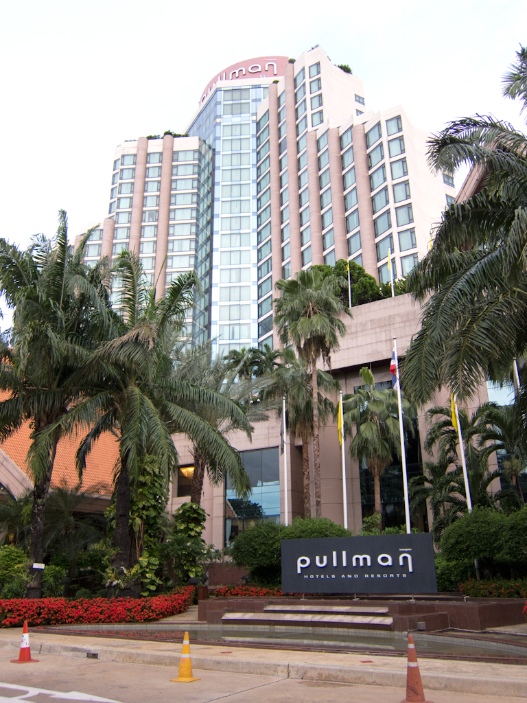 Pullman